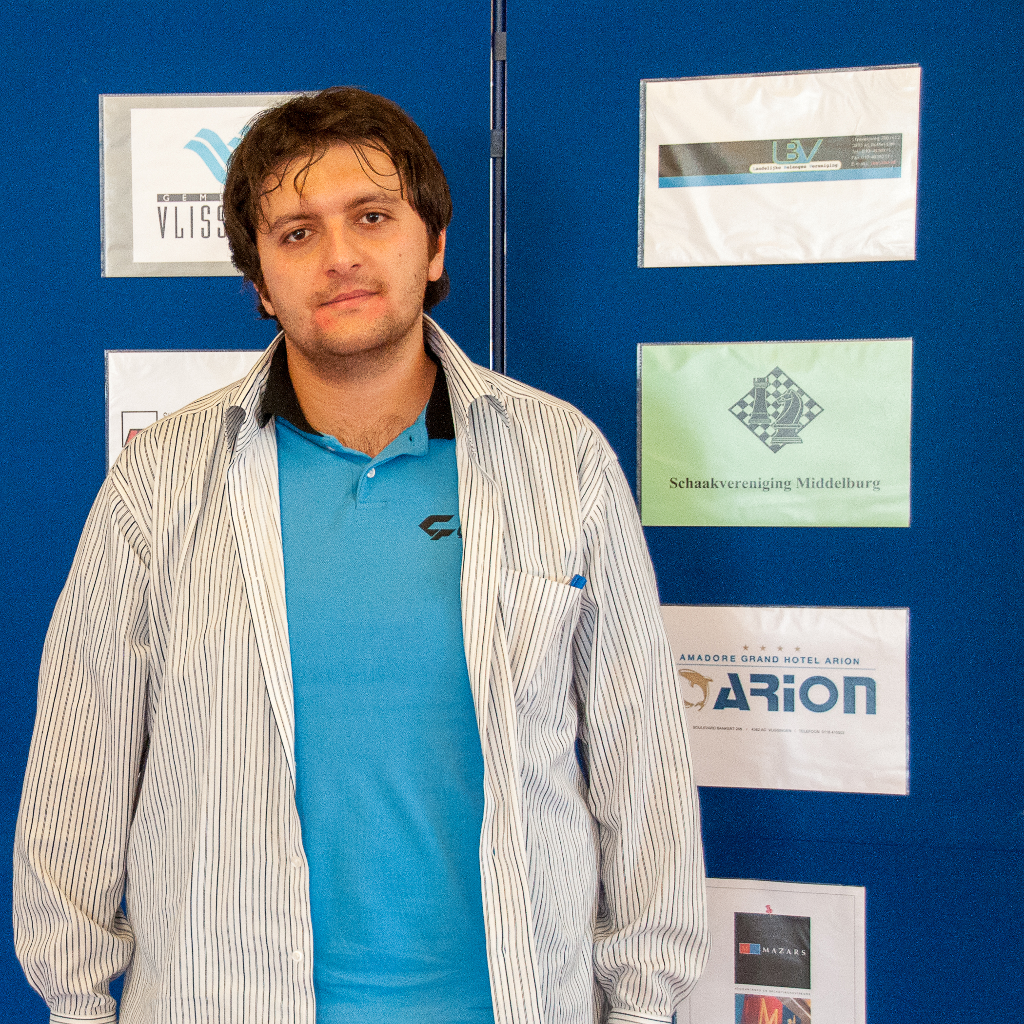 GM Baris Esen (10)